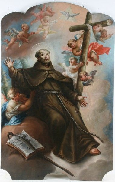 Slovak: Svätý Peter z Alcantarylabel QS:Lsk,"Svätý Peter z Alcantary"